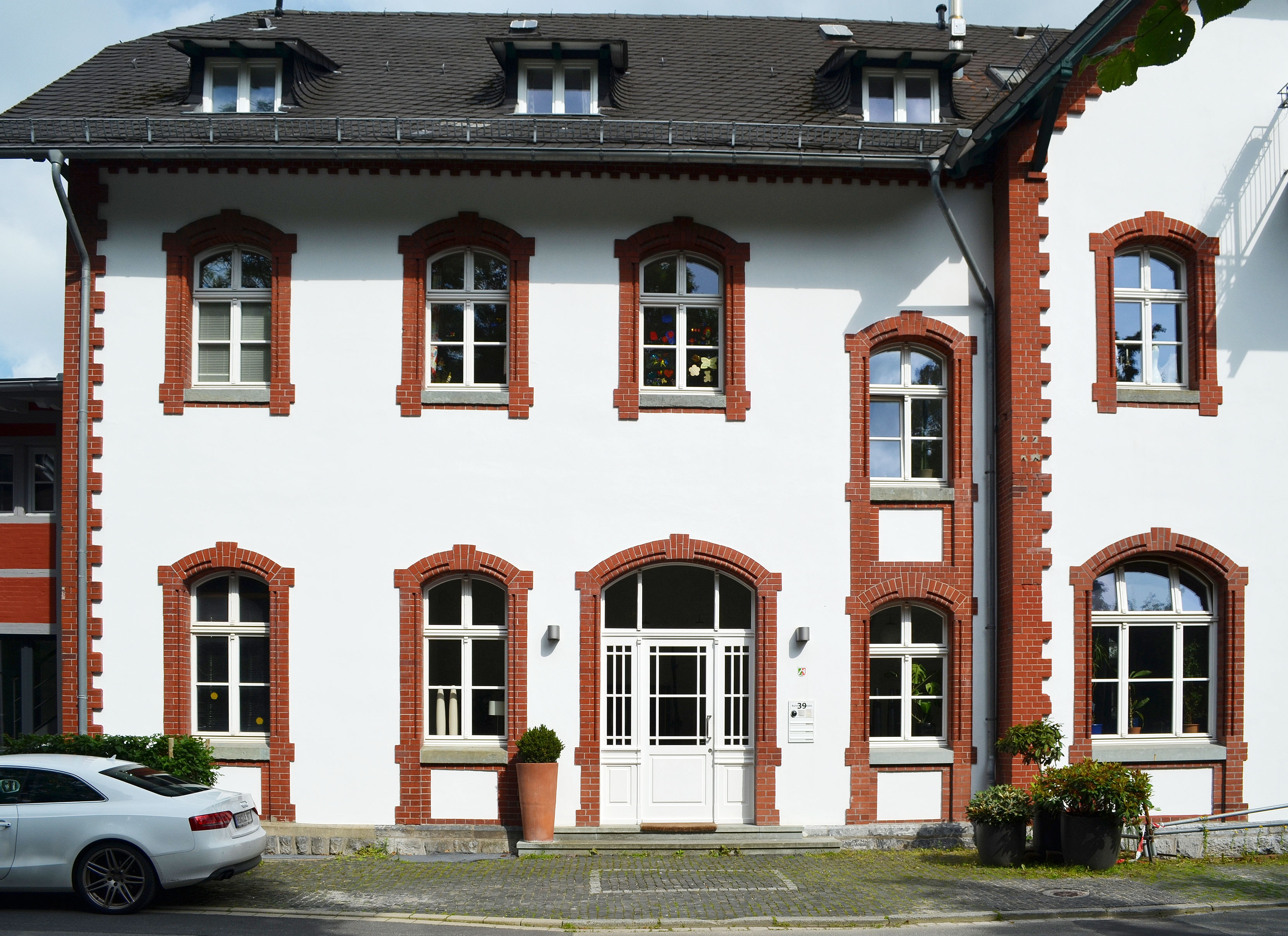 Brilon, Bahnhofstraße 39, 1